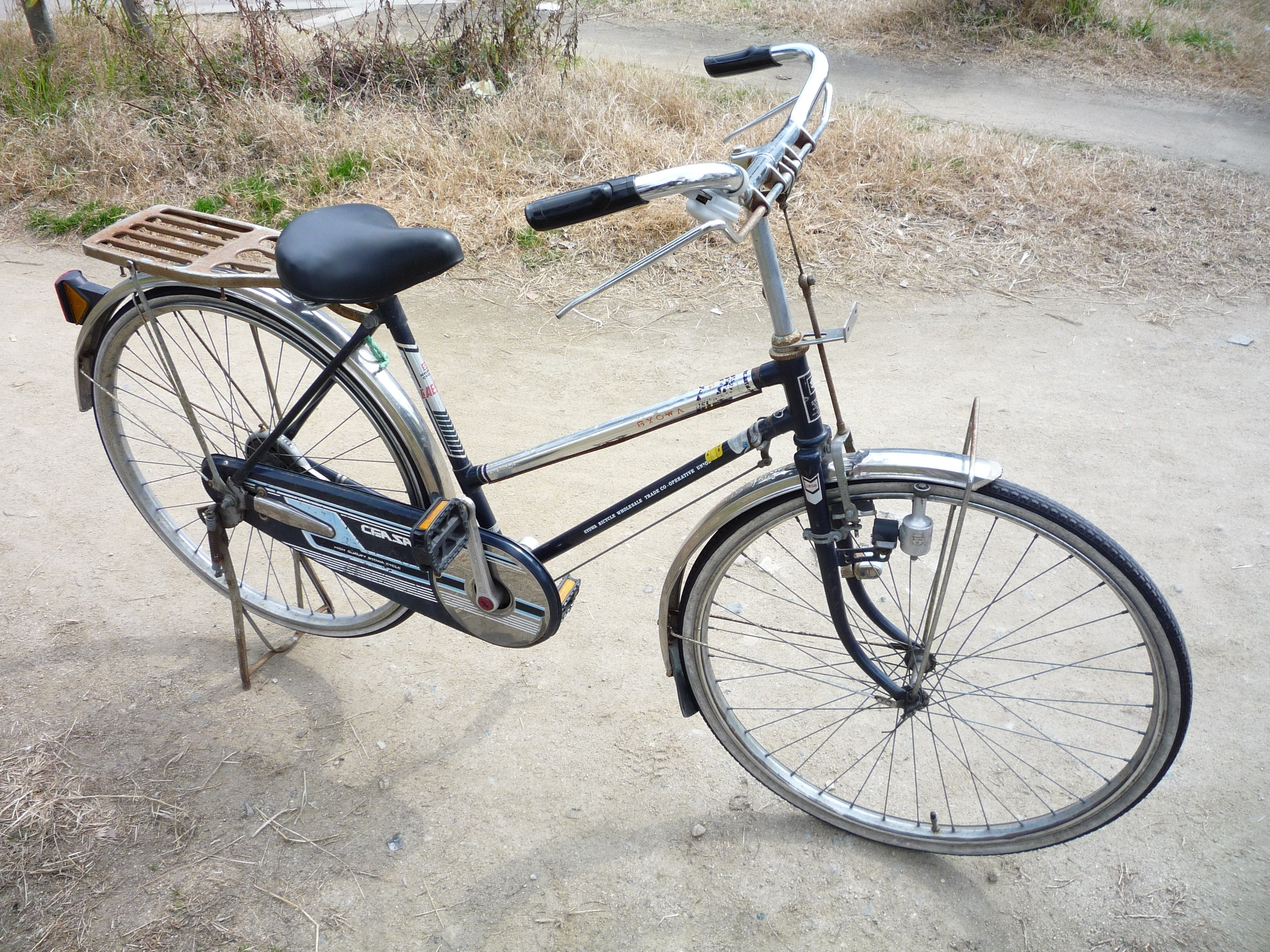 日本の古い軽快車 男女兼用型 1970年代 （サドル、ペダル、タイヤ、ベルは非オリジナル）